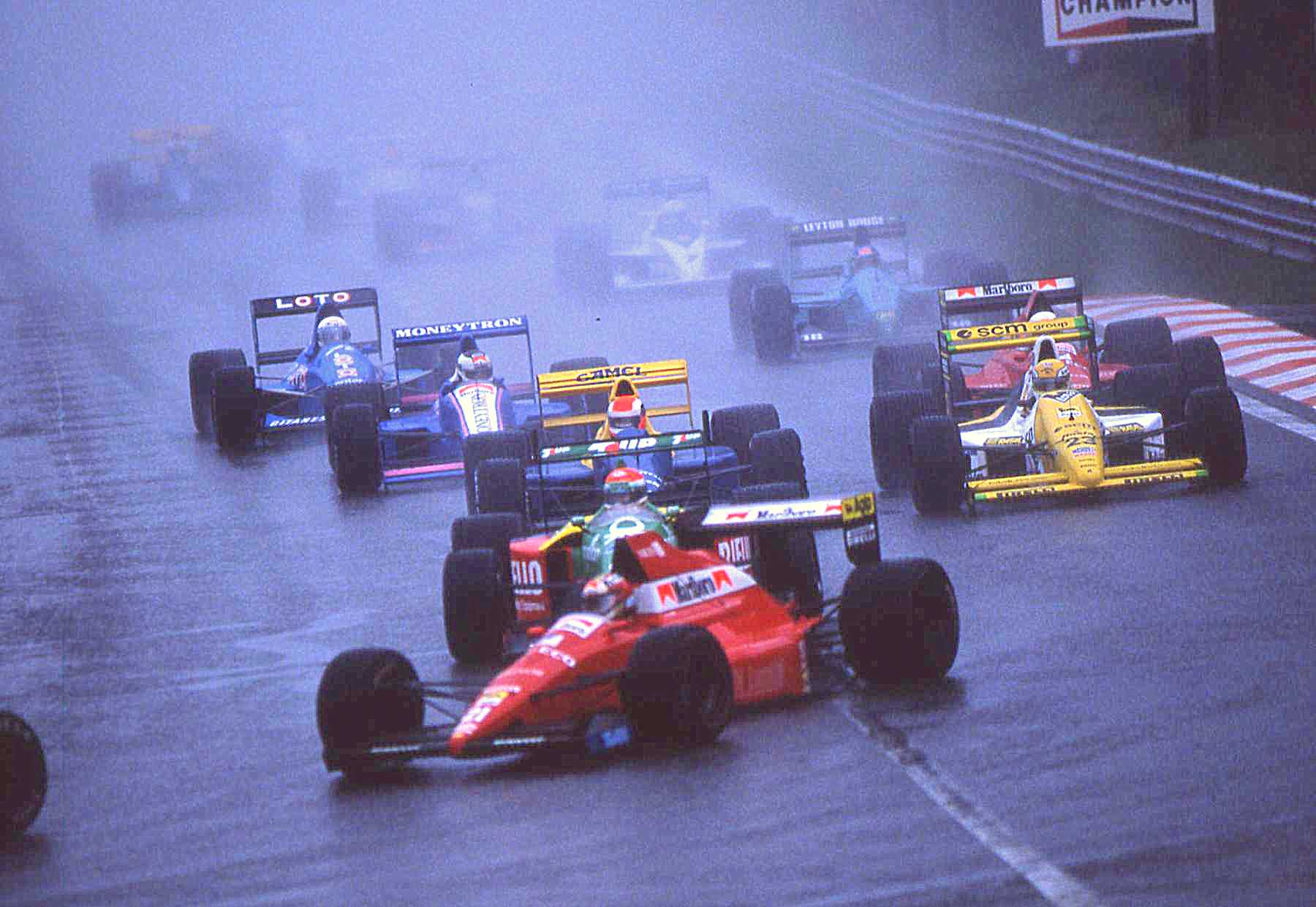 Spa , F1 ( scan diapo )